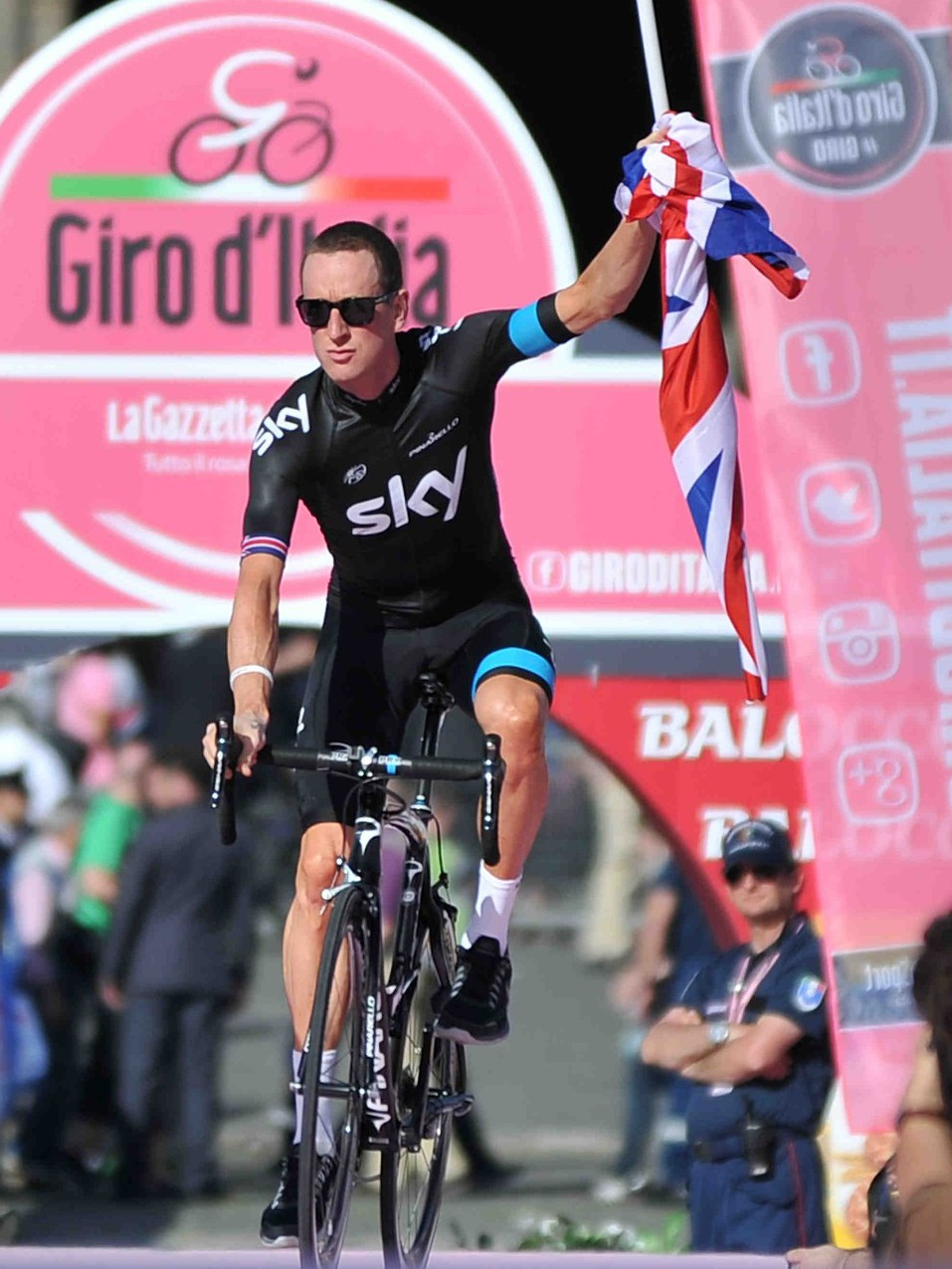 96mo Giro d'Italia, Presentación de equipos